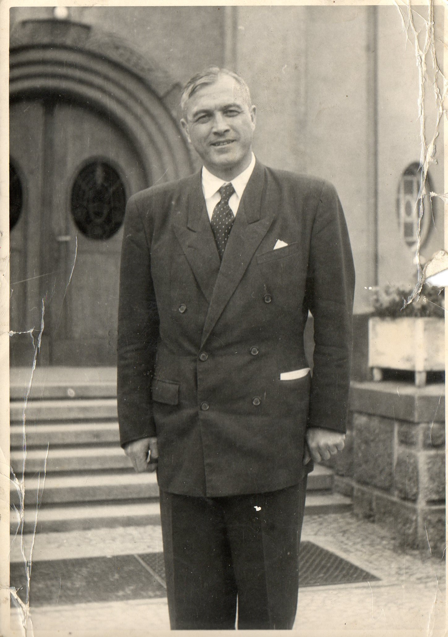 Evangelický farář Jan Amos Pellar před evangelickým kostelem v Hradci Králové